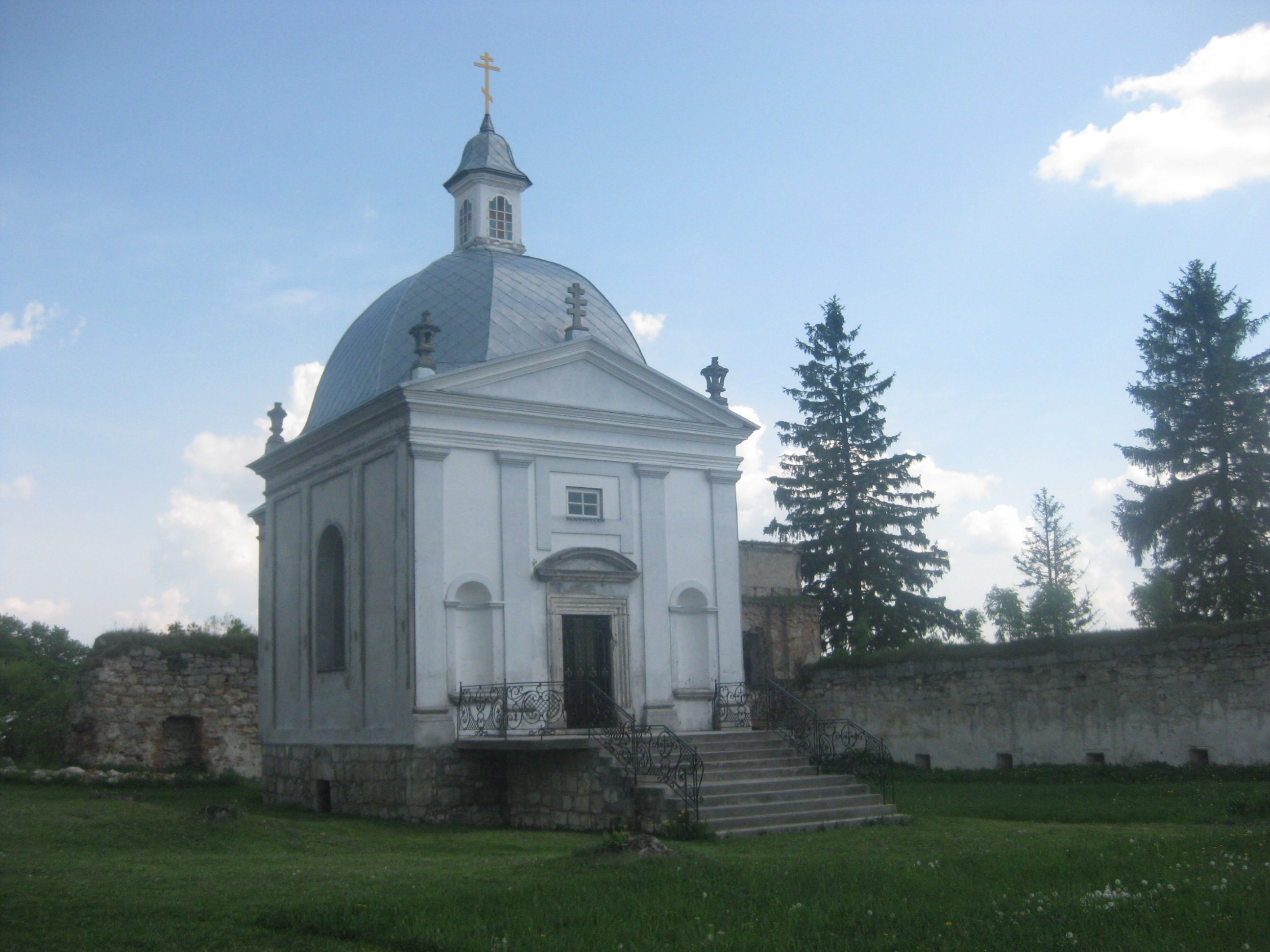 Каплиця, монастир походження дерева Хреста Господнього, Підкамінь